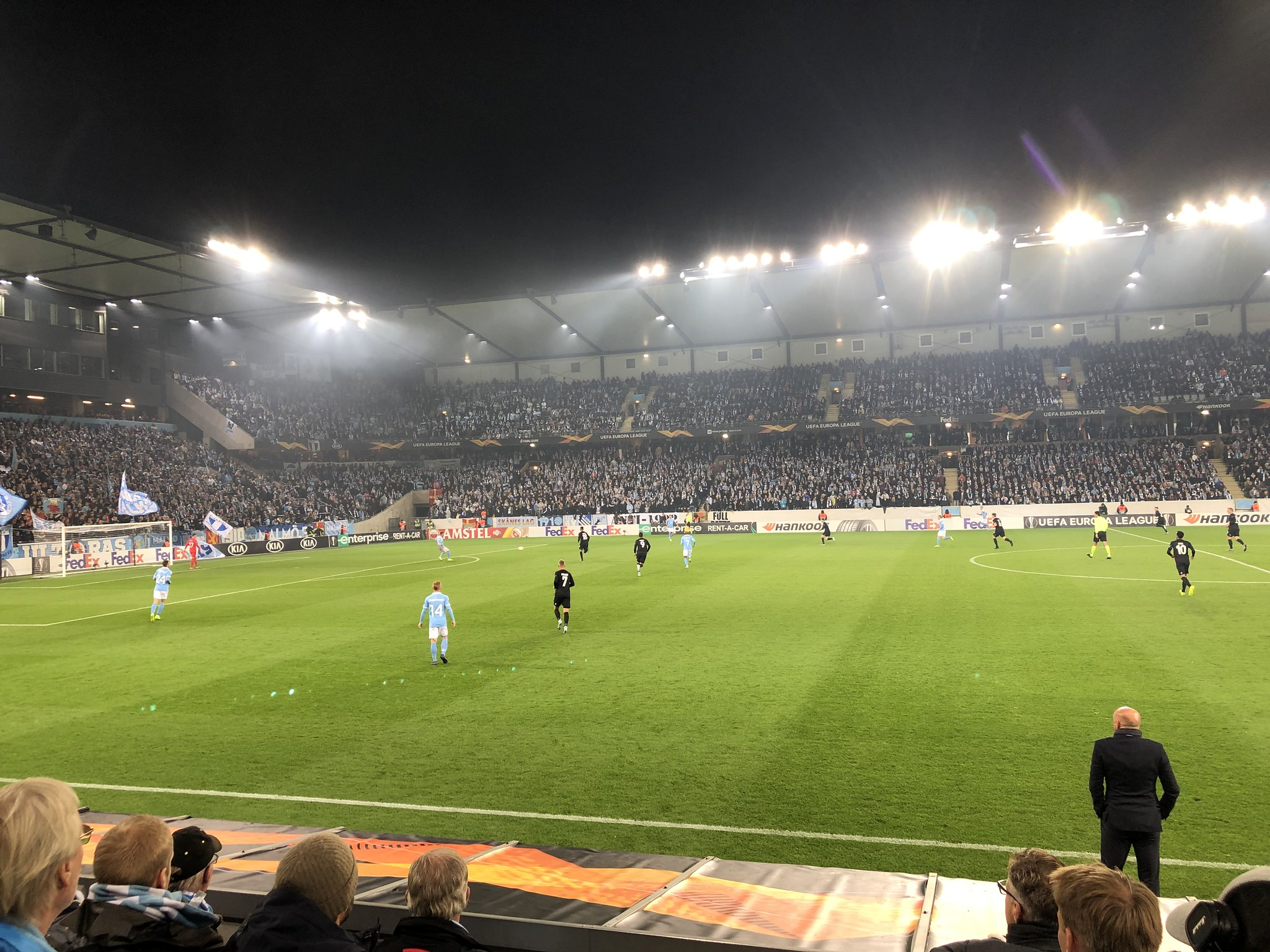 Match mellan Malmö FF och FC Köpenhamn i Uefa Europa League 2019/20